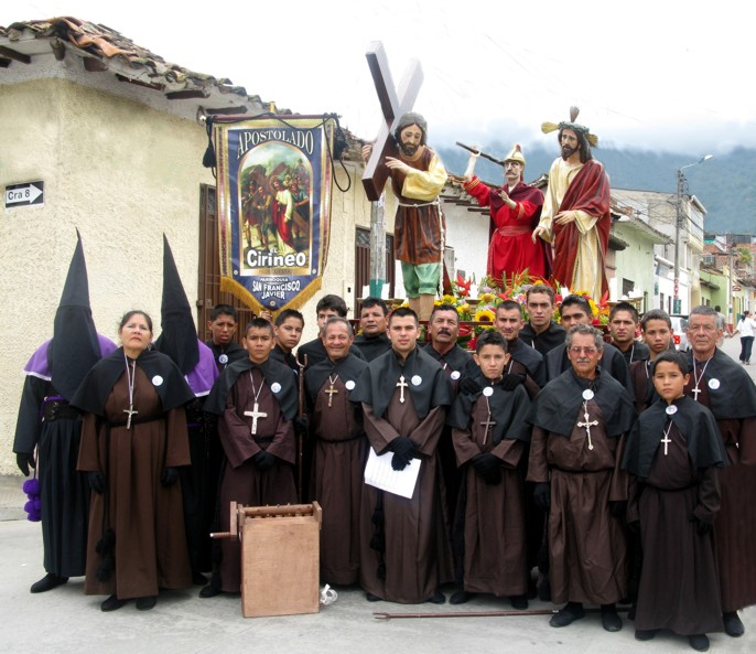 Comunidad religiosa encargada del arreglo de las imágenes de la Semana santa